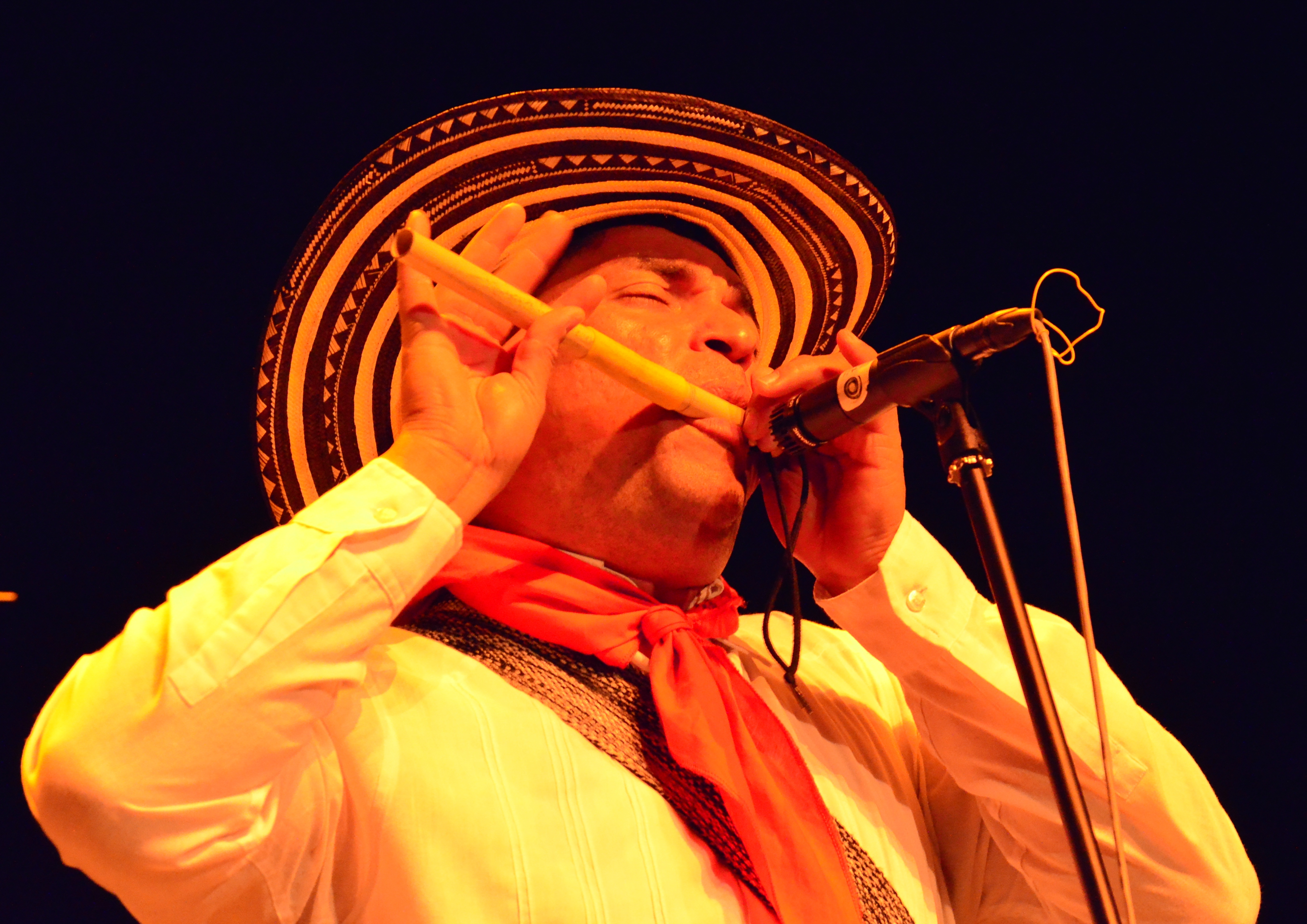 Los Gaiteros de San Jacinto